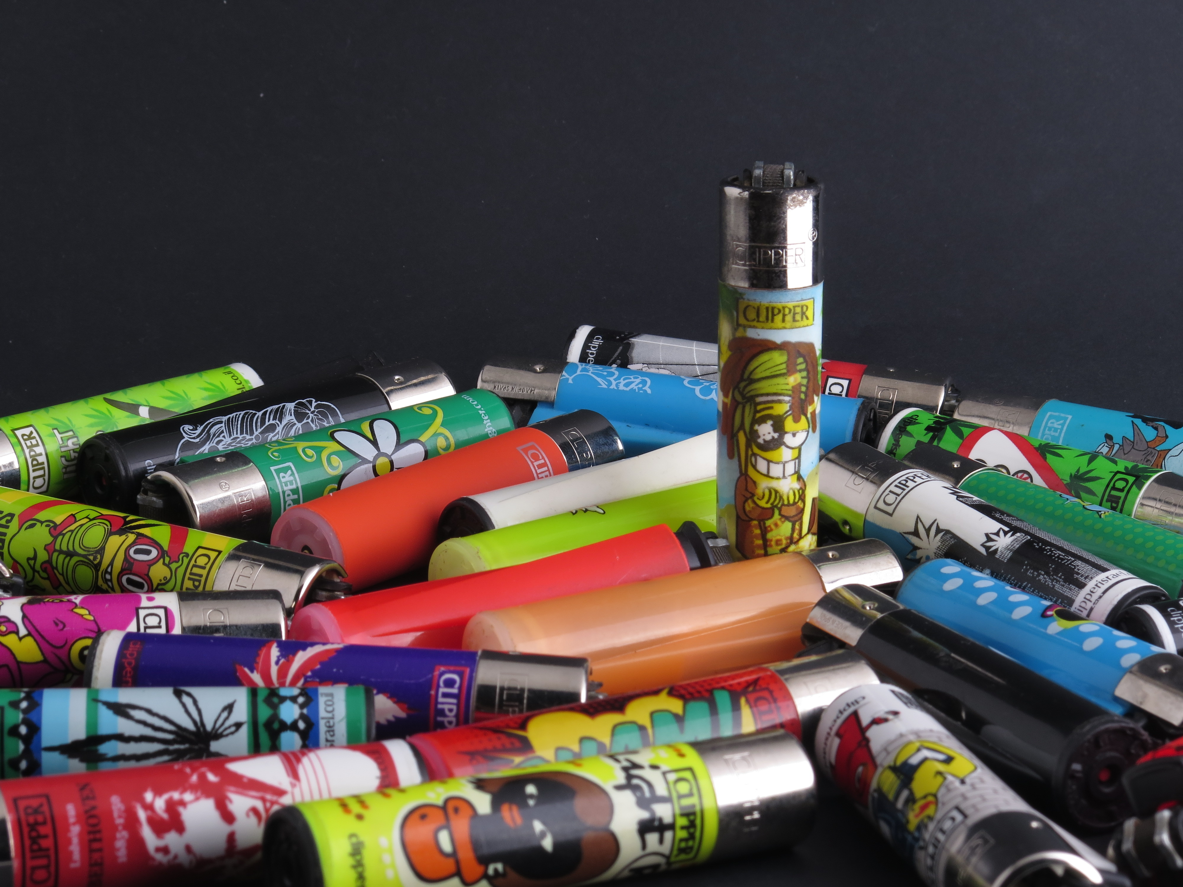 מצית, קליפר מצית רב פעמים, עד 3000 הצתות ללא מילוי